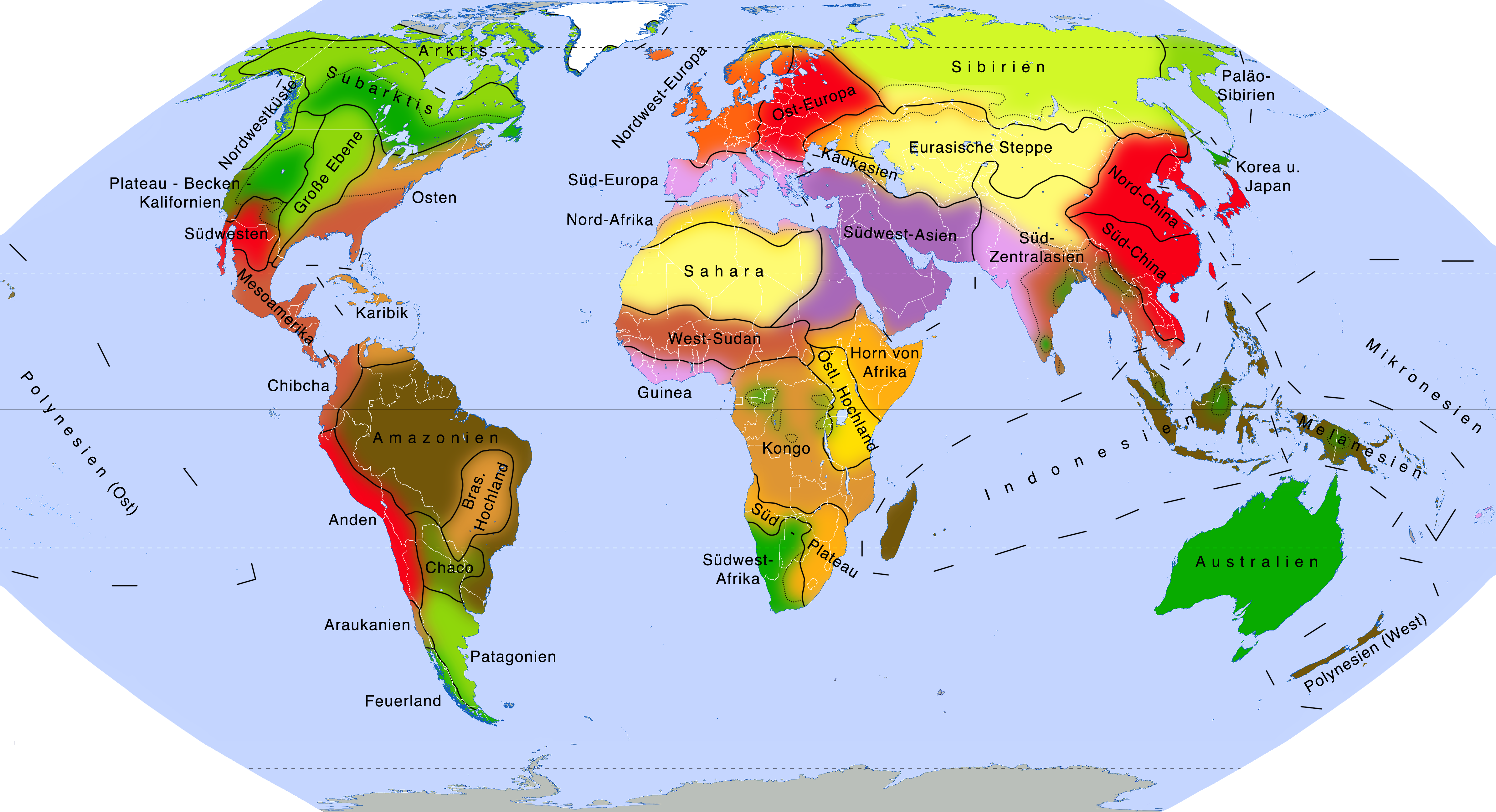 Karte von Kulturarealen Quellen Kartographie: Eckert VI-Projektion (nahezu flächentreu, realistische Größenverhältnisse, relativ wenig verzerrt), erstellt mit (Lizenz CC-BY) Datengrundlagen: David E. Hunter und Phillip Whitten (Hrsg.): Encyclopedia of Anthropology. Harper and Row, Publishers, New York u.a. 1976. ISBN 0-06-047094-1, S. 104–111. Dieter Haller: Dtv-Atlas Ethnologie. 2., vollständig durchgesehene und korrigierte Auflage. dtv, München 2010, ISBN 978-3-423-03259-9, S. 40. Unklare Zuordnungen verifiziert über: Willi Stegner (Hrsg.): TaschenAtlas Völker und Sprachen. Klett-Perthes, Gotha 2006. Grenzziehungen verifiziert über physikalische Weltkarte (Alexander-Atlas) und Wiki-Karte Vegatationszonen.png